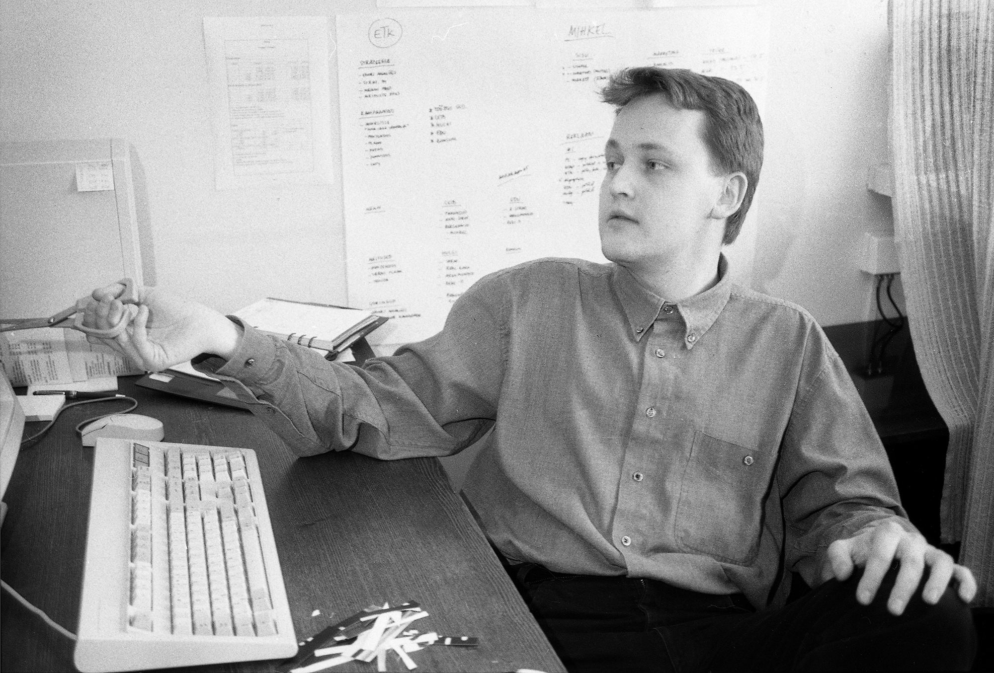 Kaur Hanson, ühiskonnategelane 93